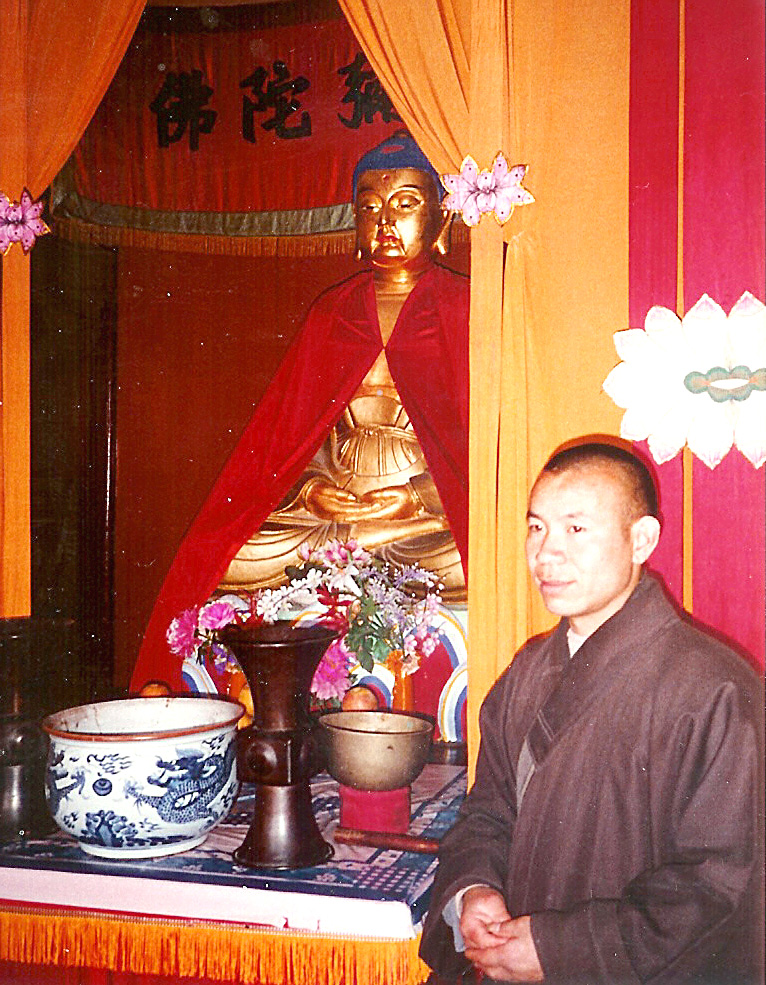 China: E Buddah, gutt bewaacht ernmuhl.